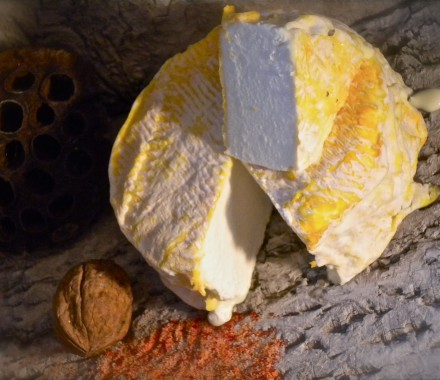 Fromage Pierre-qui-Vire ( fromagerie Tourrette )